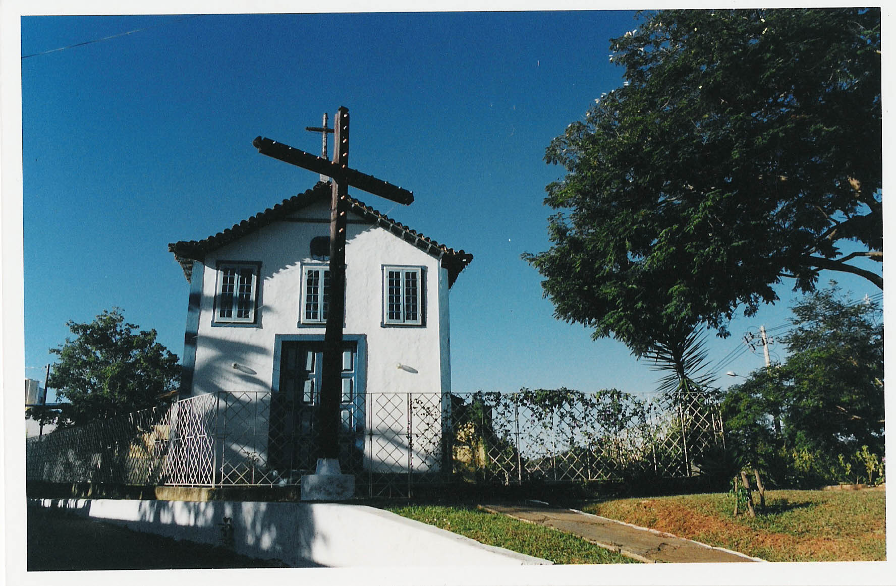 Capela de Nossa Senhora do Rosário - Lagoa Santa/MG (Fonte: Prefeitura Municipal de Lagoa Santa)